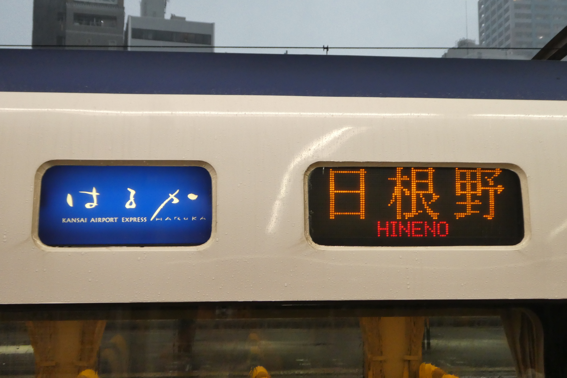 関西空港連絡橋被災により、日根野行きとなっている関空特急「はるか」。